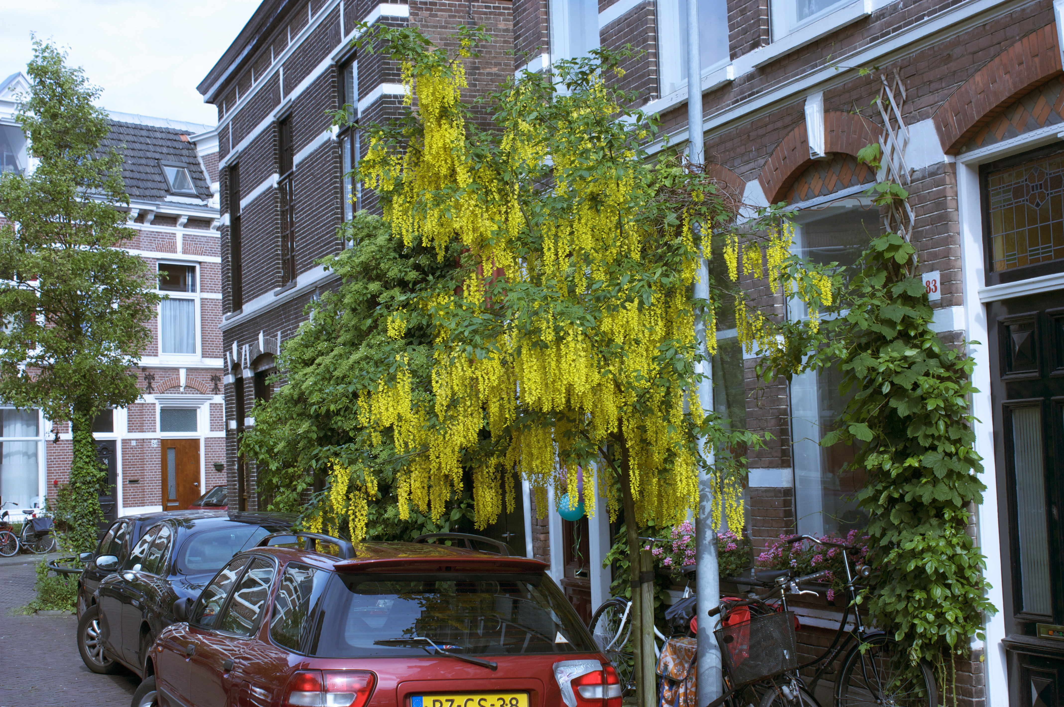 Laburnum × watereri, Haarlem, Netherlands